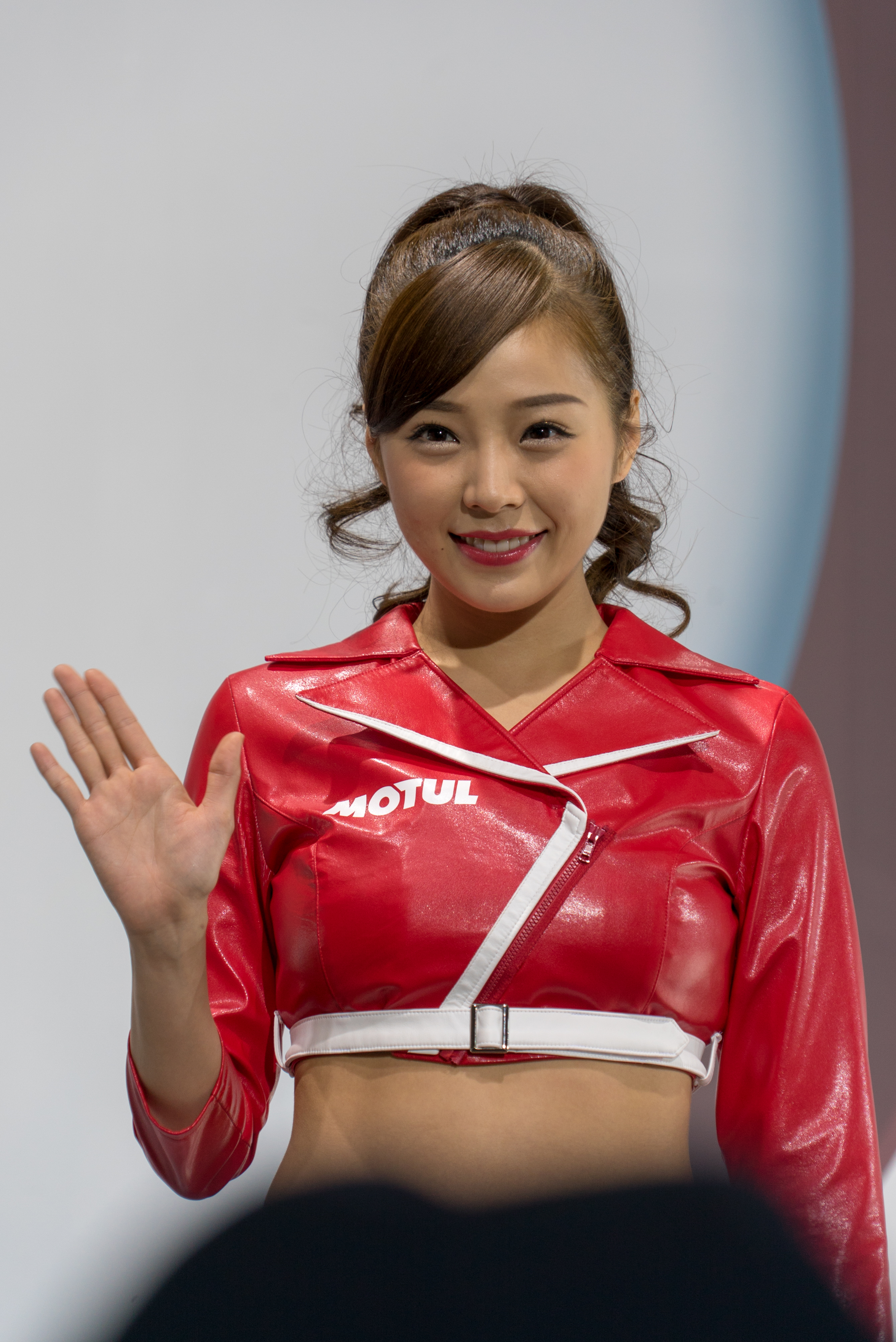 TOKYO AUTO SALON 2018-10.jpg